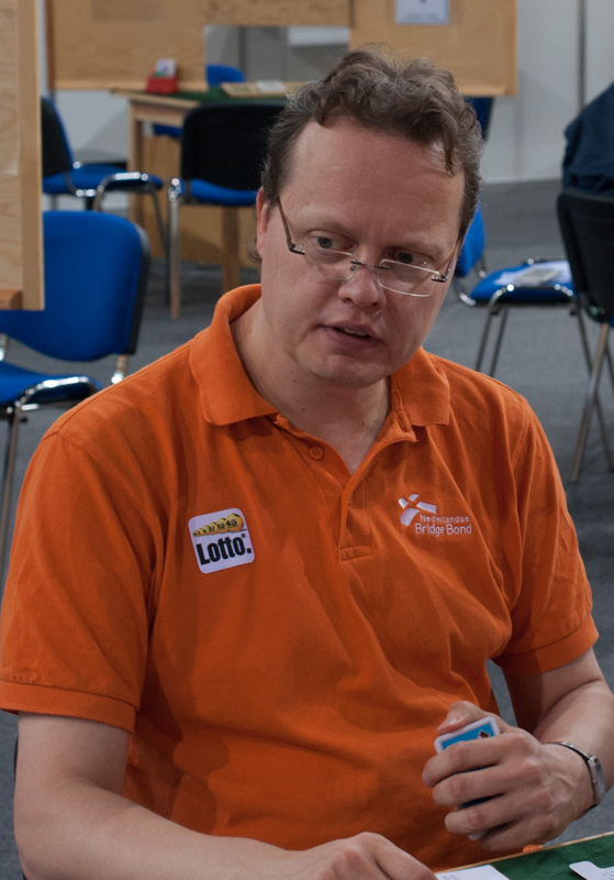 Netherlands van Prooijen Ricco